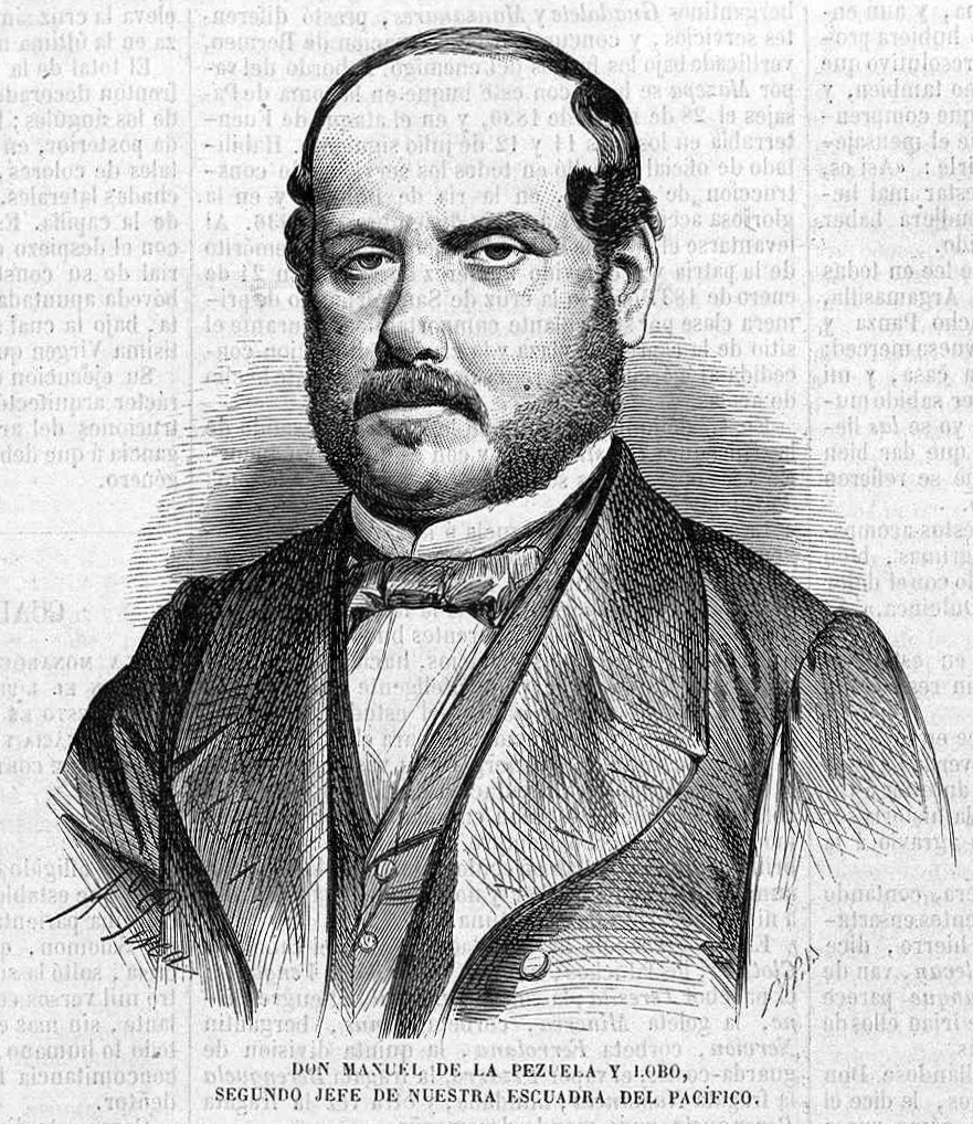 Manuel de la Pezuela y Lobo, en el El Museo Universal.